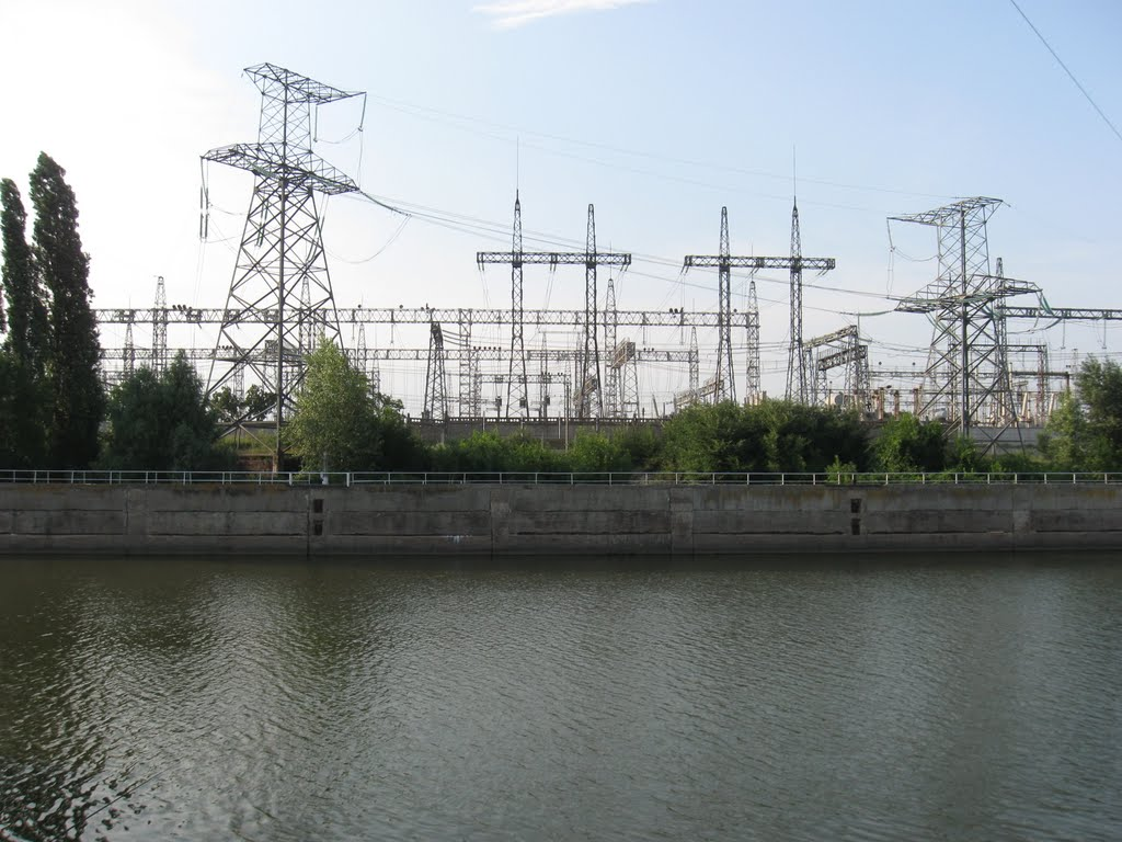 Світловодськ, Кременчуцька ГЕС